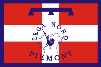 Lliga Nord del Piemont